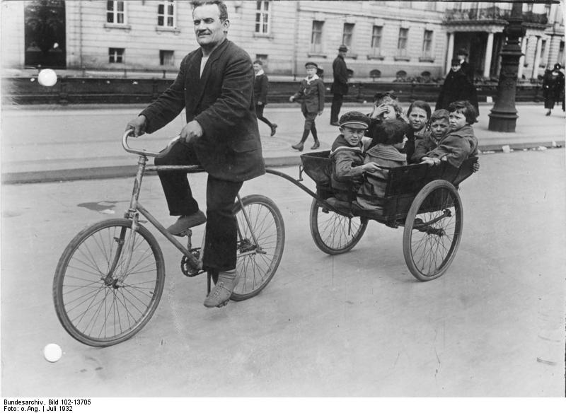 Ein praktischer Berliner ! Ein kinderreicher Vater macht mit seinen Kindern im selbstgebauten Fahrrad mit Anhänger einen Ausflug. Juli 1932